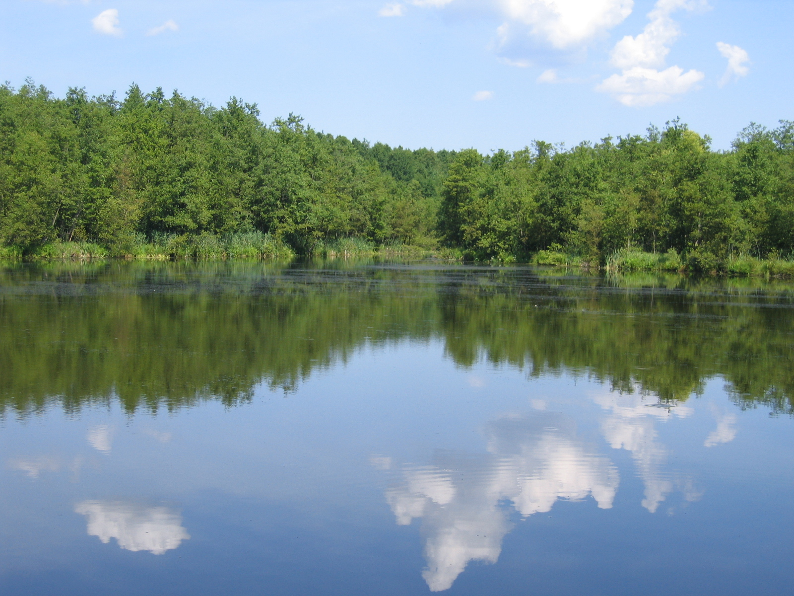 Bukówka - Staw Rychlicki.